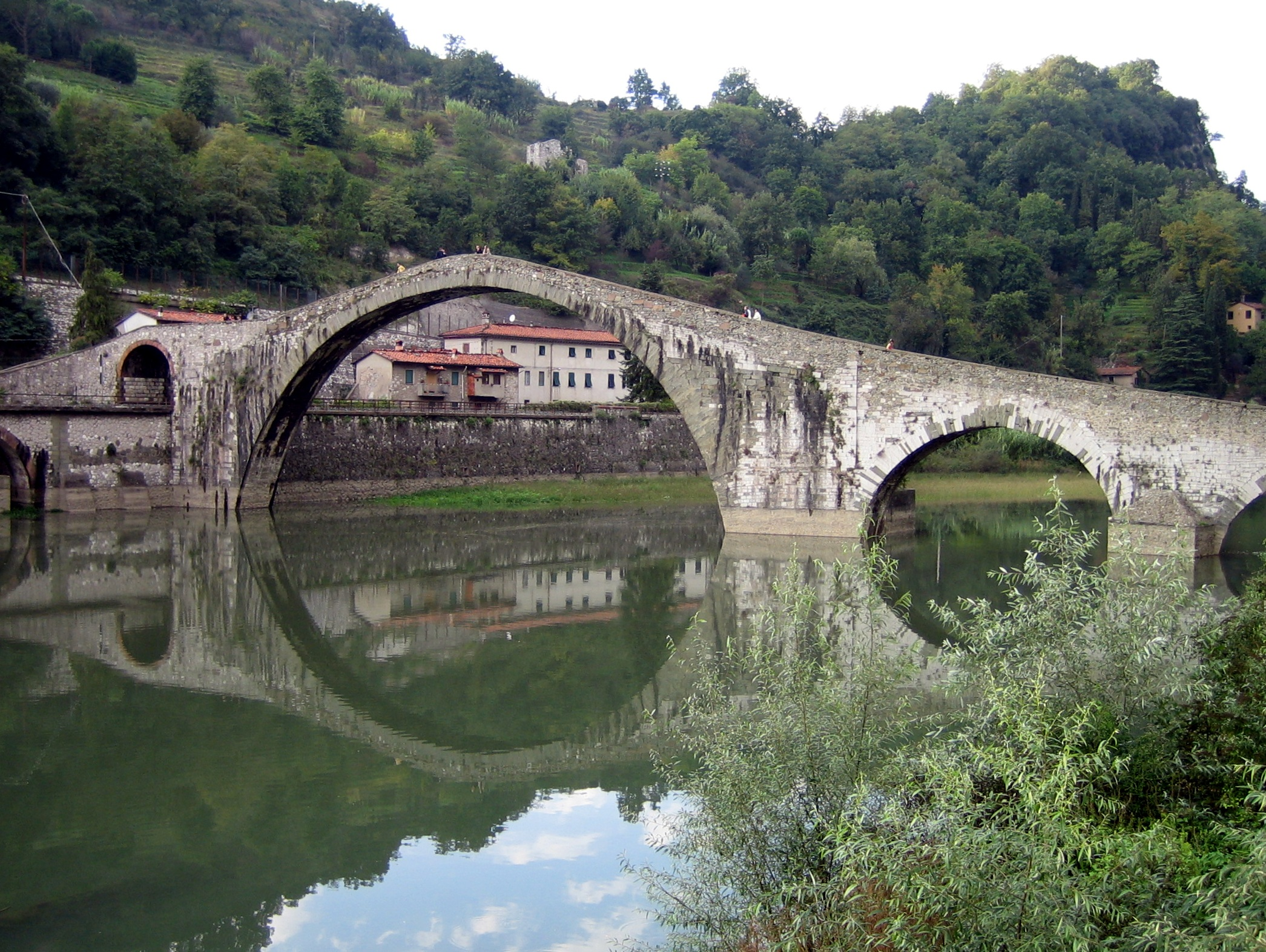 Ponte della Maddalena, Borgo a Mozzano (Province of Lucca).